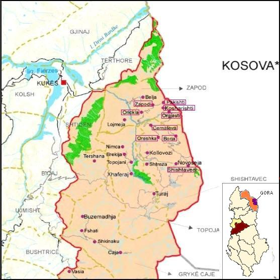 Harta e Rajonit të Gorës